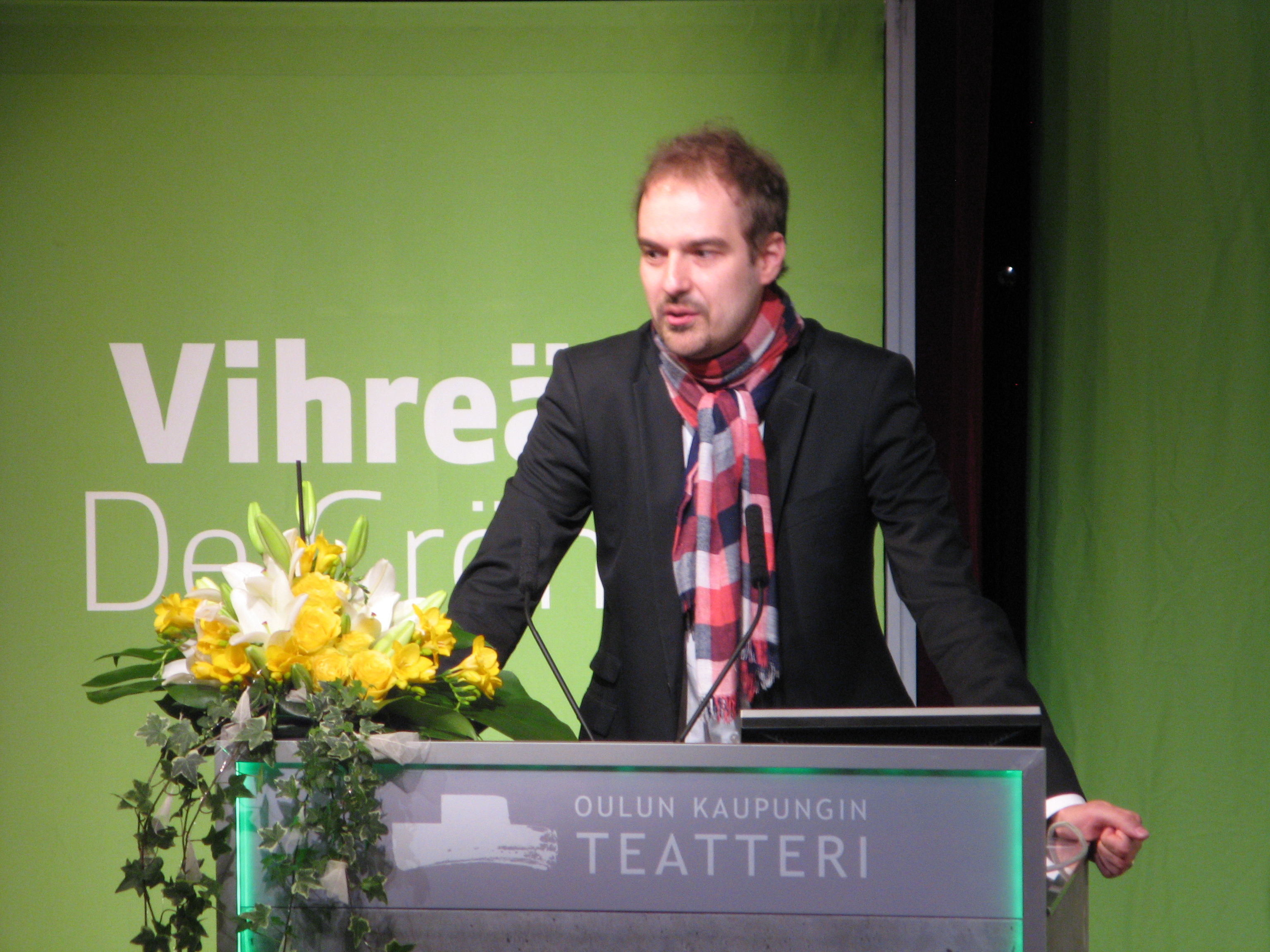 Lasse Miettinen